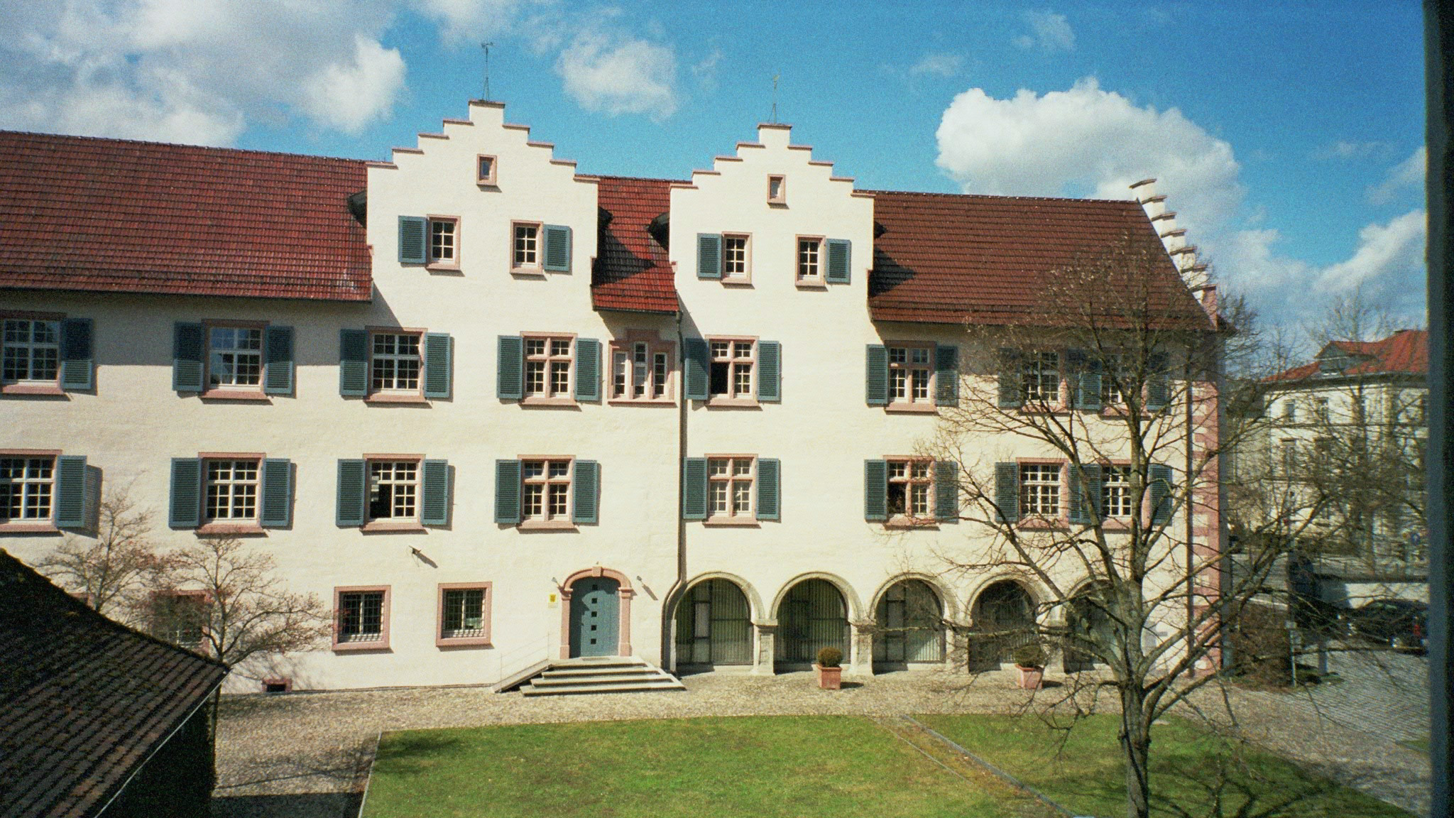 Lanzenhof in D-78462 Konstanz, Torgasse 8. Heute Gebäude der Staatsanwaltschaft Konstanz.